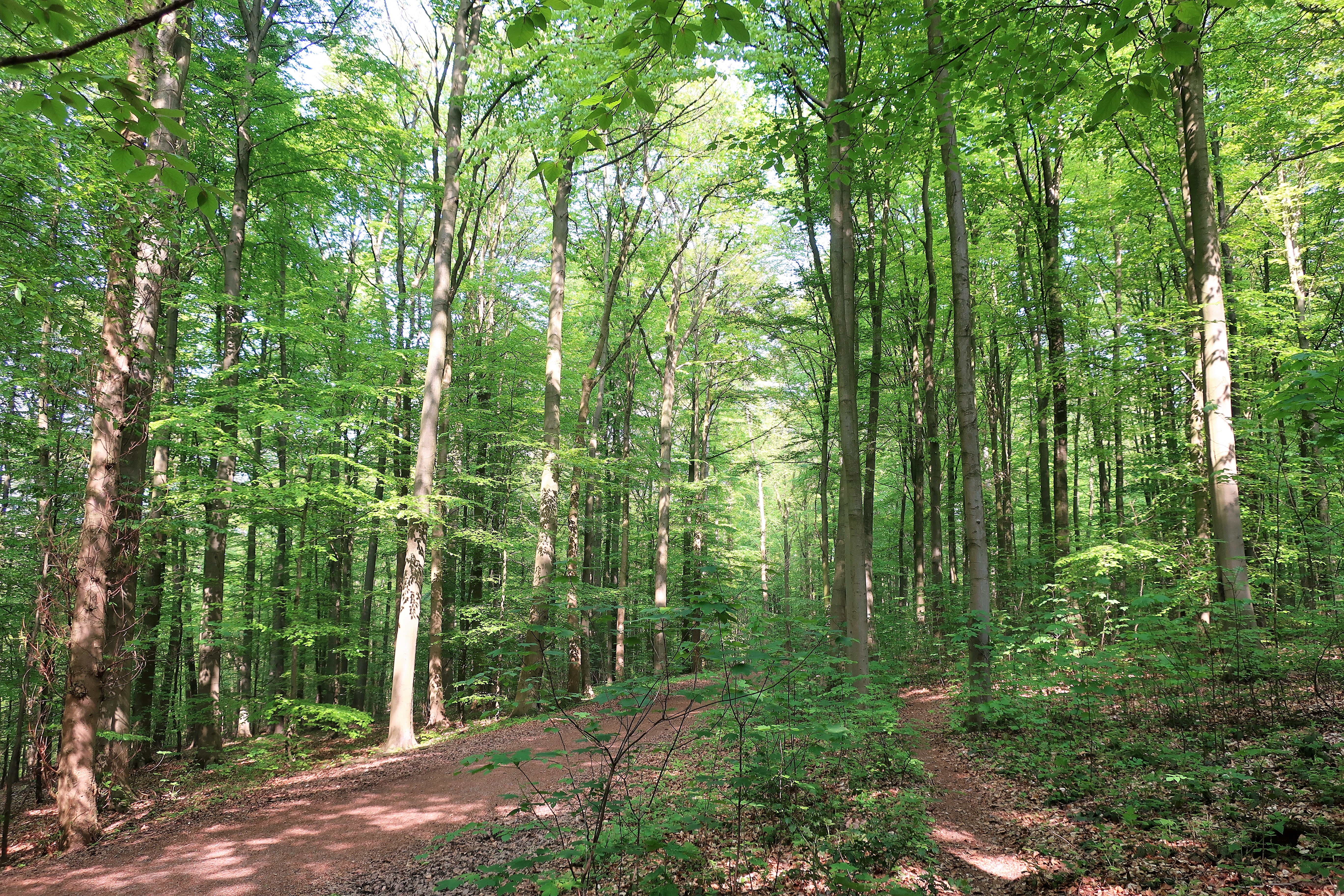 Blick auf einen Wanderweg durch den Fleyer Wald Nähe Hoheleye in Hagen. Das Landschaftsschutzgebiet Fleyer Wald (LSG HA 1.2.2.16) mit seinem „Wald-Erlebnis-Pfad“ hat eine Fläche von 119,65 ha.